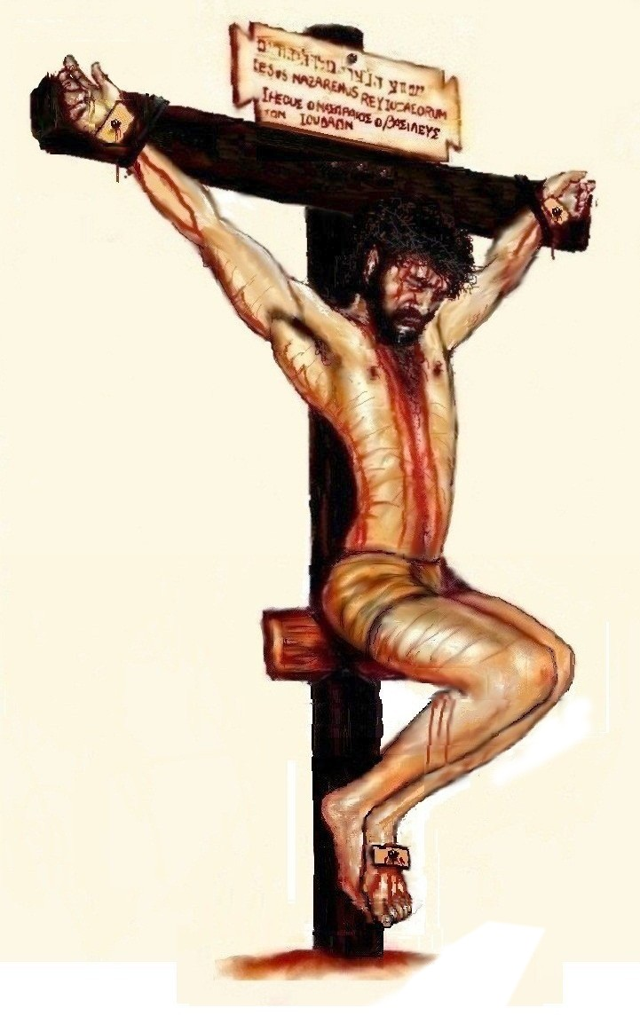 Cruz Immissa.